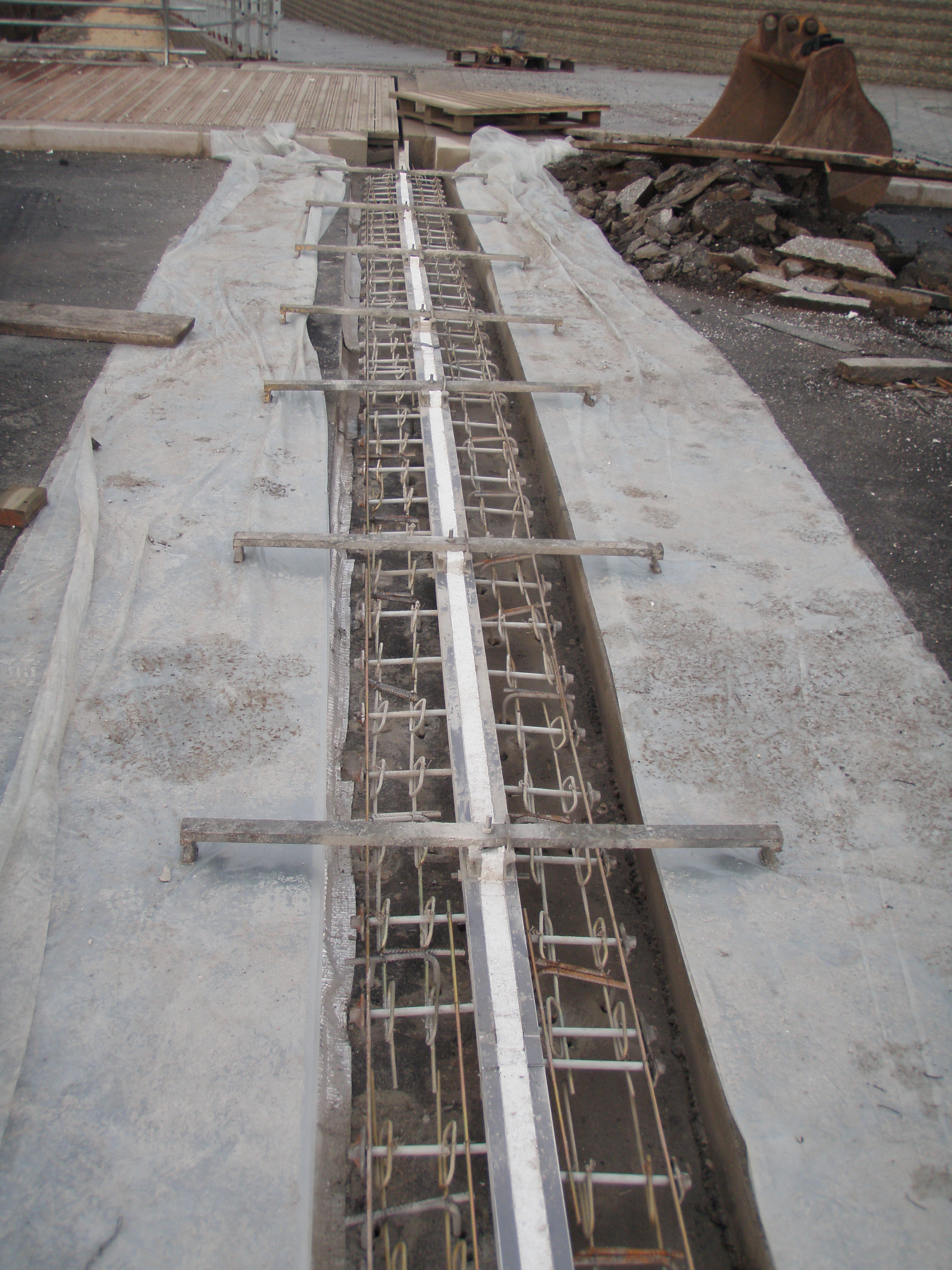 join de dilatation du pont de chartreuse grenoble encore en travaux